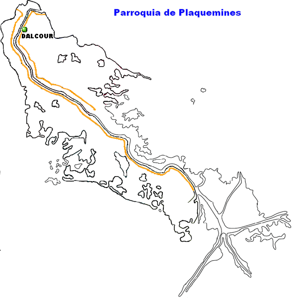 Dalcour, Louisiana.